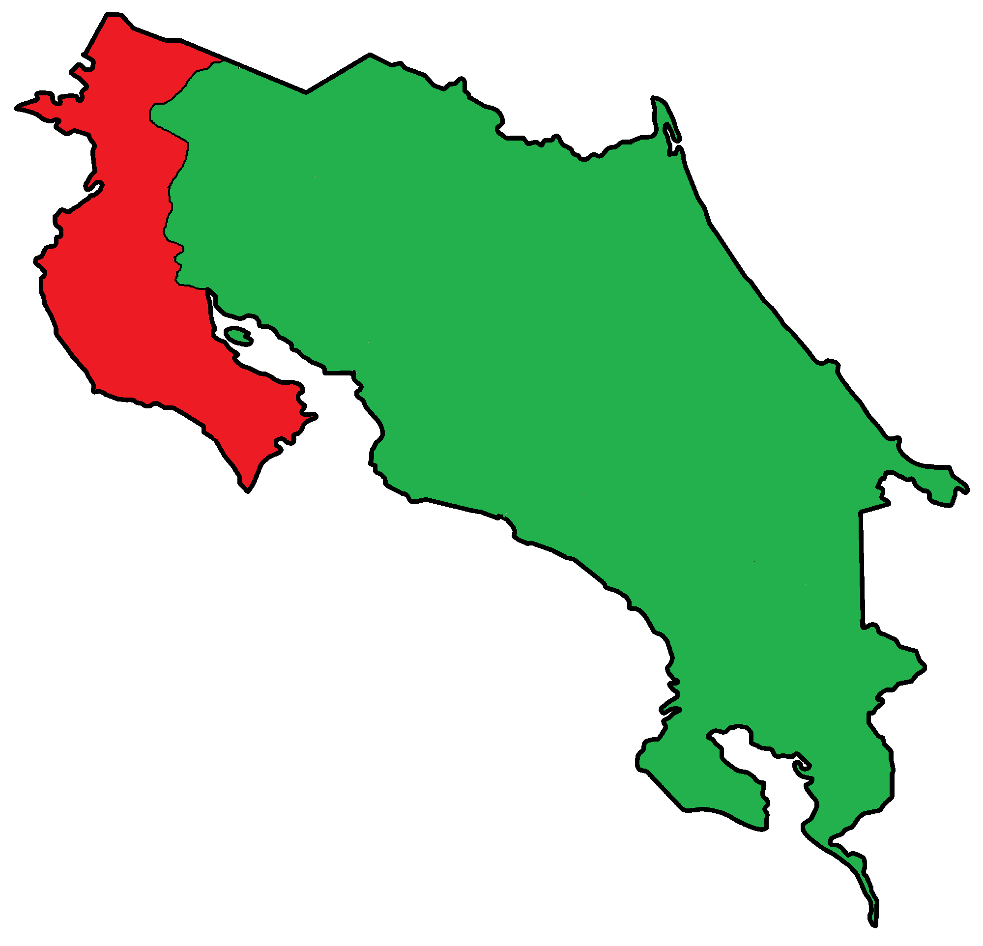 Mapa con los límites aproximados del Partido de Nicoya en 1824.